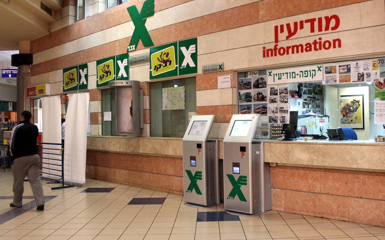 עמדות רב קו